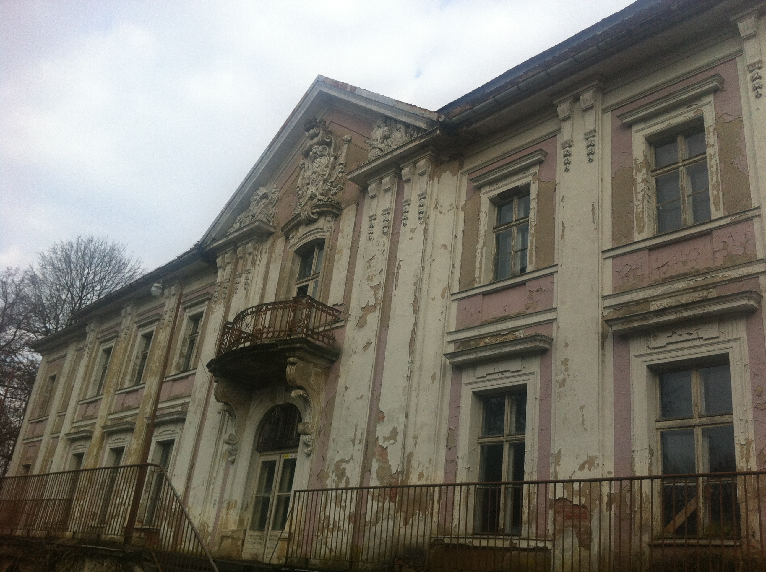 Tuczno - zespół pałacowy z XVIII-XIX w.: pałac z lat 1897-1899 (zabytek nr 210)